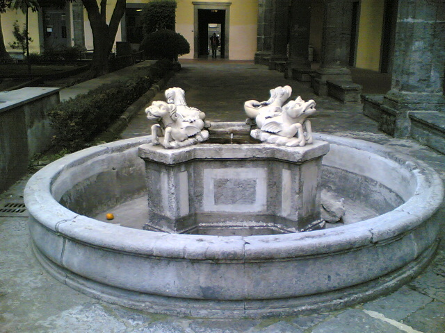 Una delle fontane anonime di Napoli, Chiostro di San Marcellino e Festo